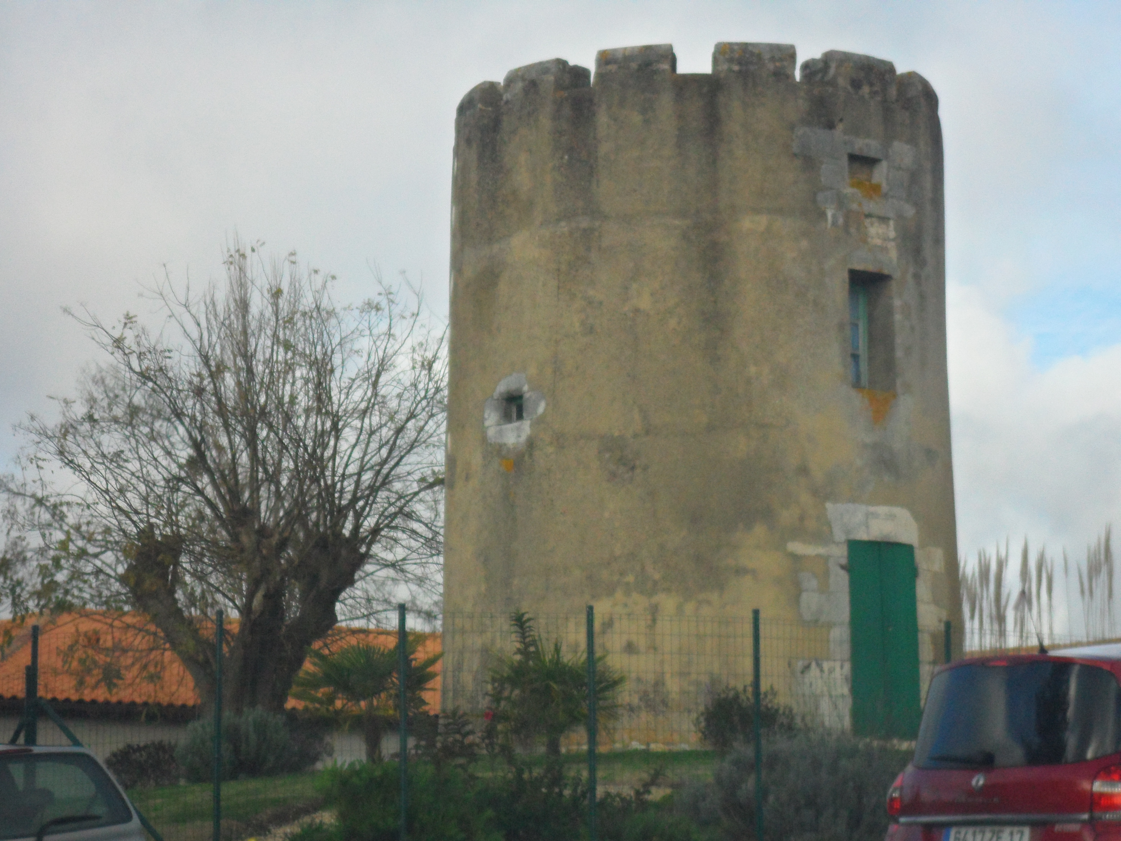 Moulin de Cabouci à Arvert